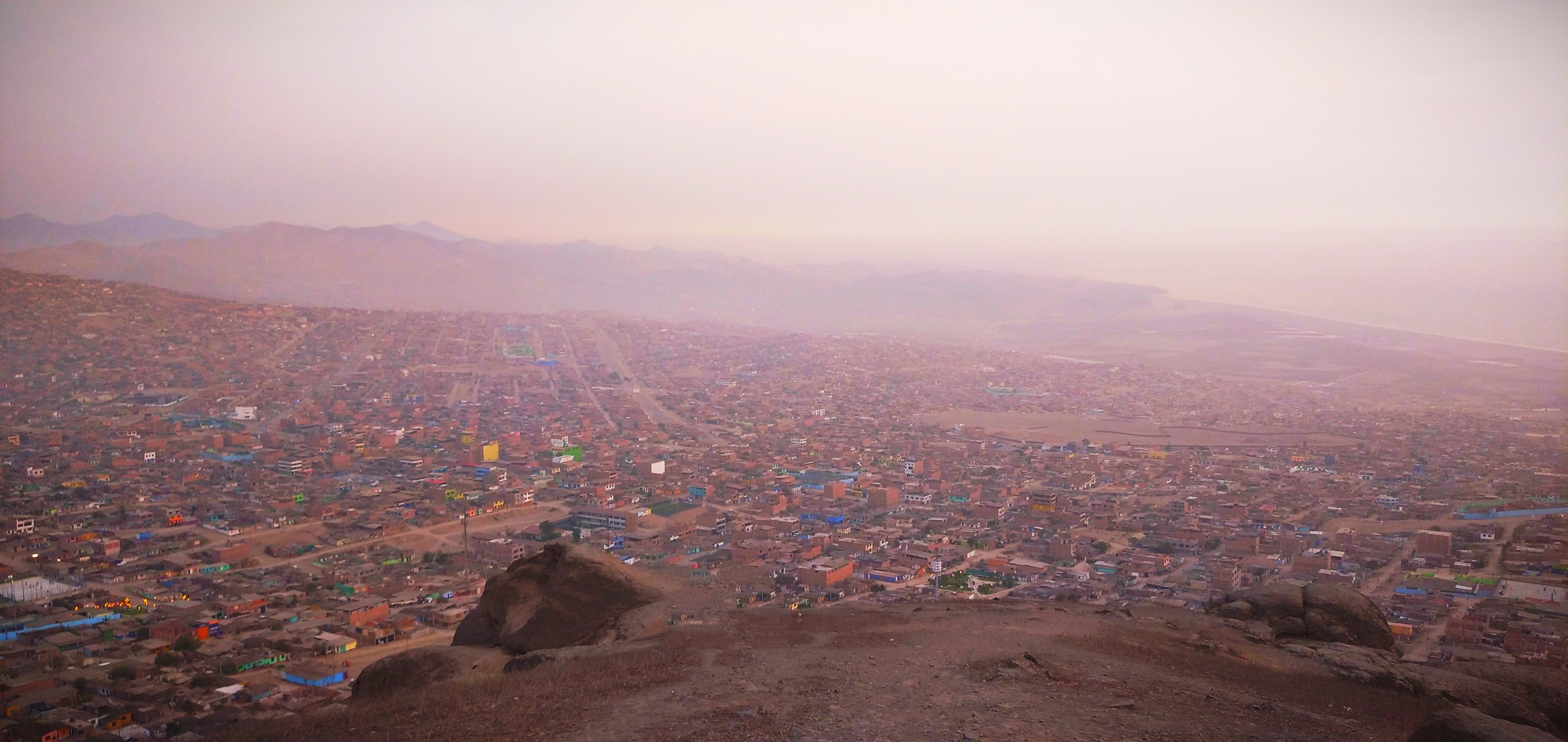 vista de Ciudad Pachacutec